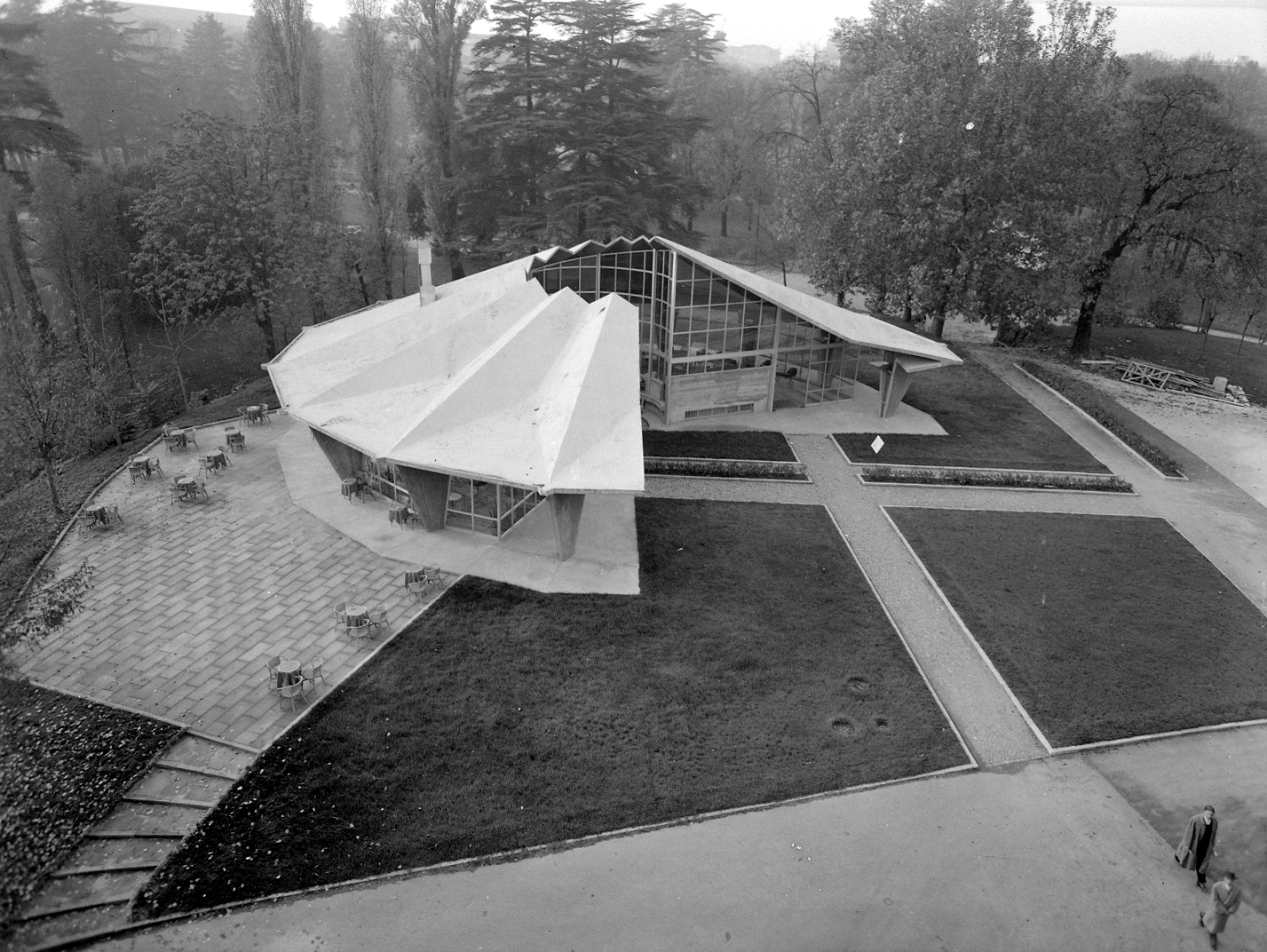 Servizio fotografico : Milano, 1954 / Paolo Monti. - Buste: 5, Fototipi: 5 : Negativo b/n, gelatina bromuro d'argento/ pellicola ; 10x12. - ((Serie costituita da 5 negativi identificati con i nn.: 21119-21120, 21151-21153. La suddetta serie è contenuta nella scatola identificata con la numerazione 21113-21153. Sulla scatola manoscritto con pennarello nero: "X dal 1494 al 1580". La scatola è a sua volta contenuta in una scatola grande col coperchio giallo. - Occasione: Documentazione della X Triennale del 1954, intitolata "Prefabbricazione - Industrial Design: Esposizione Internazionale delle Arti Decorative e Industriali Moderne e dell'Architettura Moderna". L'esposizione si tenne presso il Palazzo dell'Arte